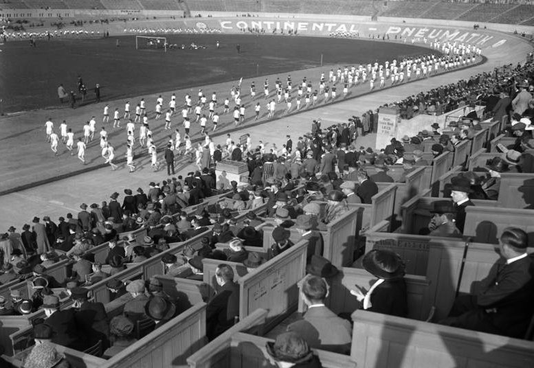 Propagandalaufen deutscher Athletik-Vereine fand am 30. März 1923 im Deutschen Stadion statt. 4000 Läufer passieren das Stadion